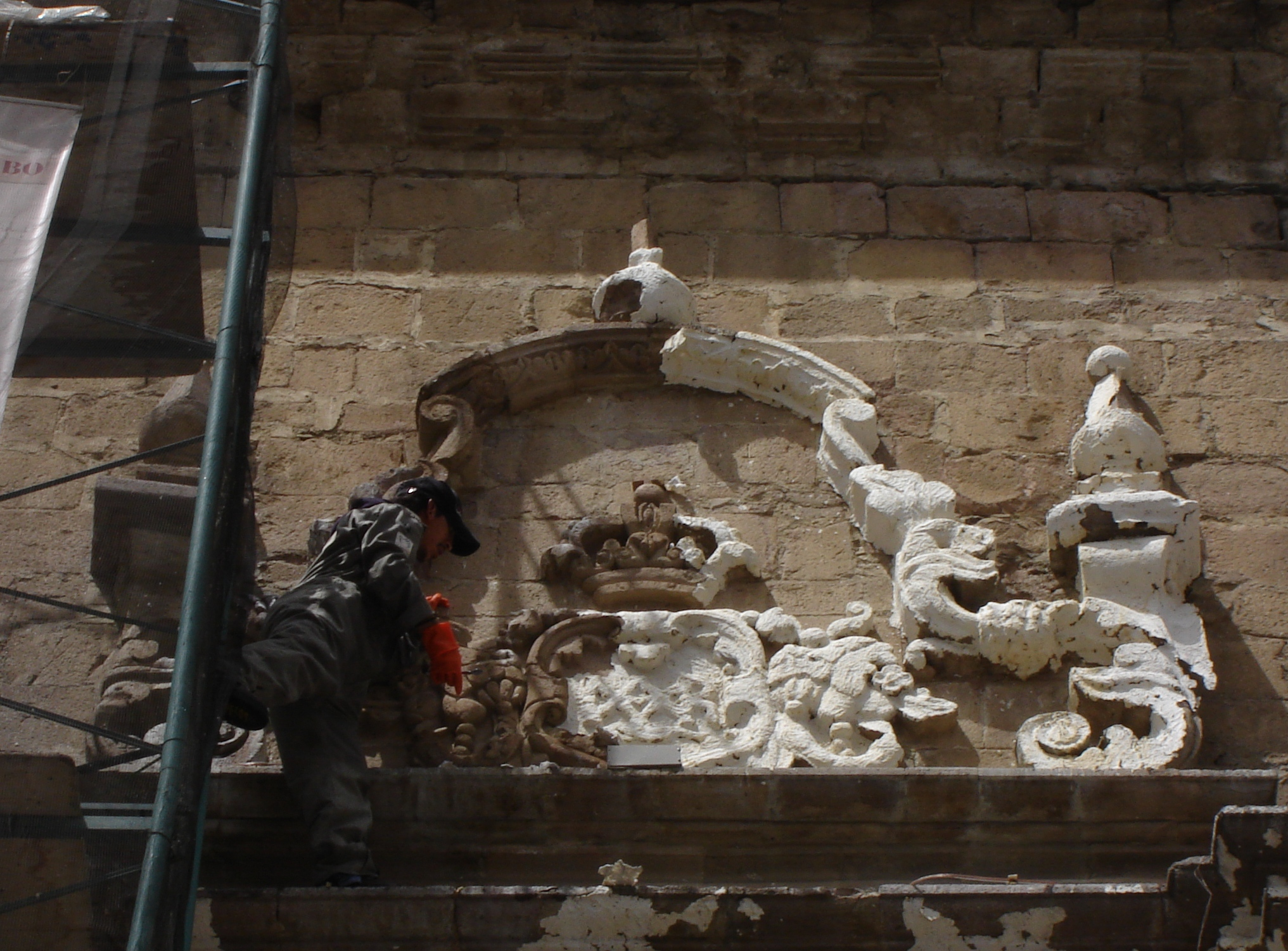 Técnicos relaizando labores de mantenimiento en el templo de San Francisco en La Paz